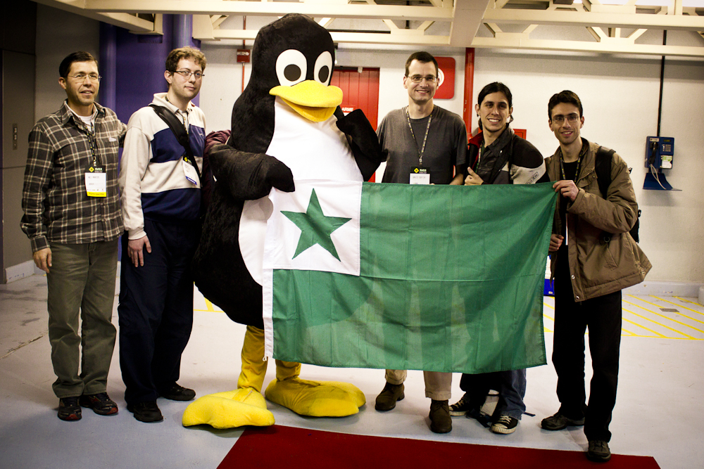 Movimentação do segundo dia na FISL 2012 - programadores esperantistas.